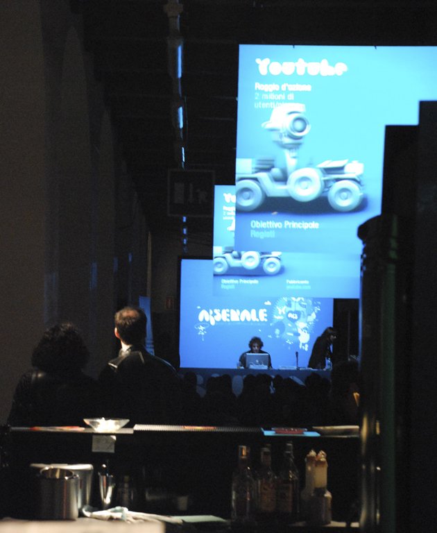 Festival della Creatività 2008, Florence, Italy. A conference about multimedia.